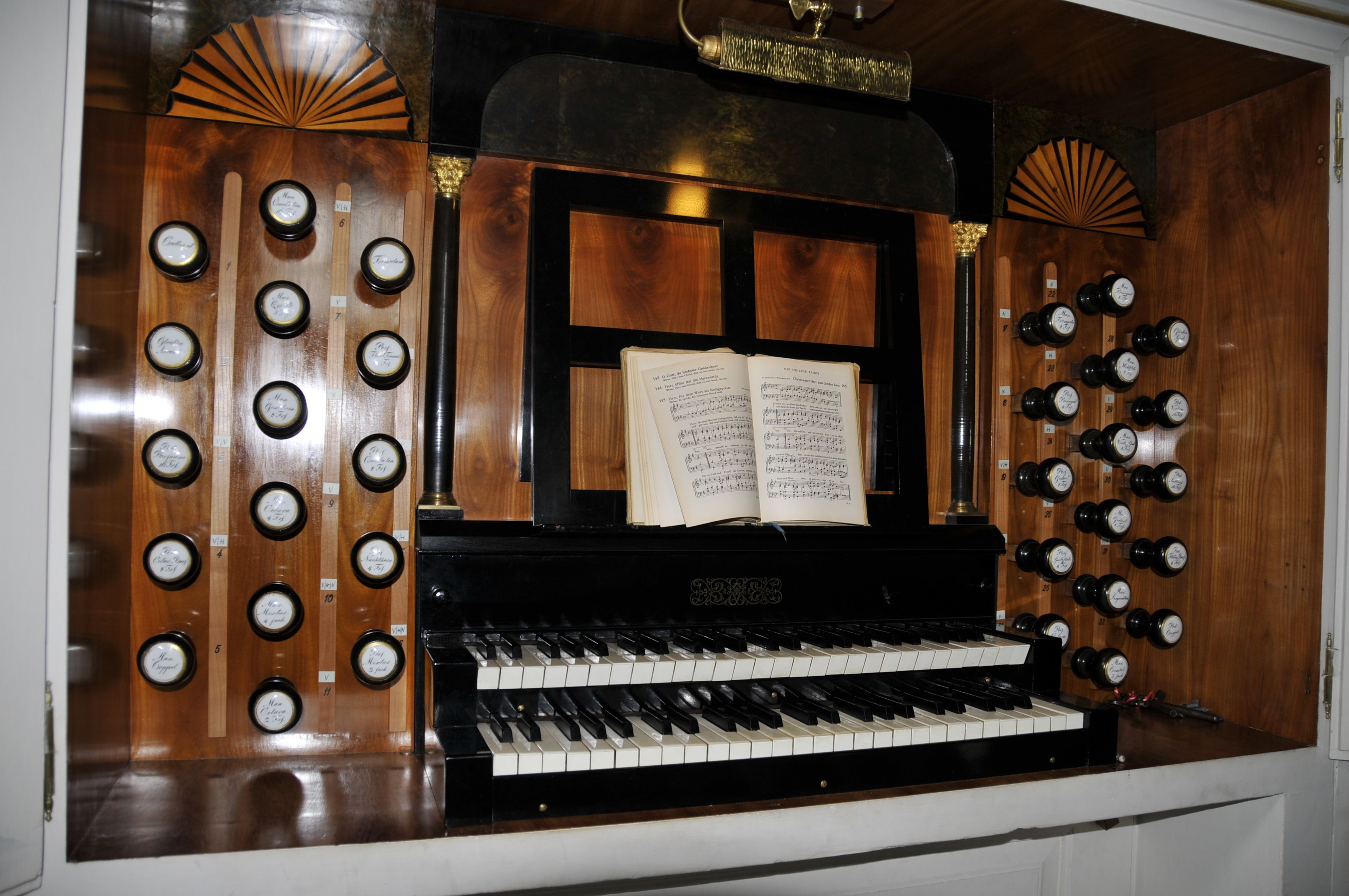 Orgelmanuale Mühlberg